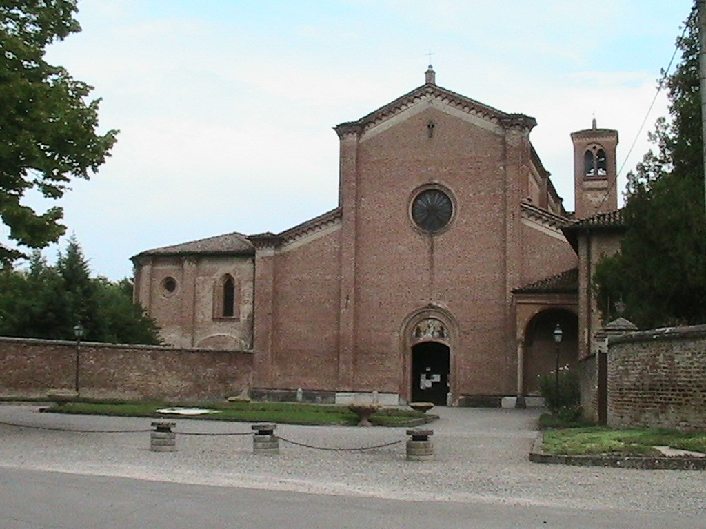 Busseto - Santa Maria degli Angeli